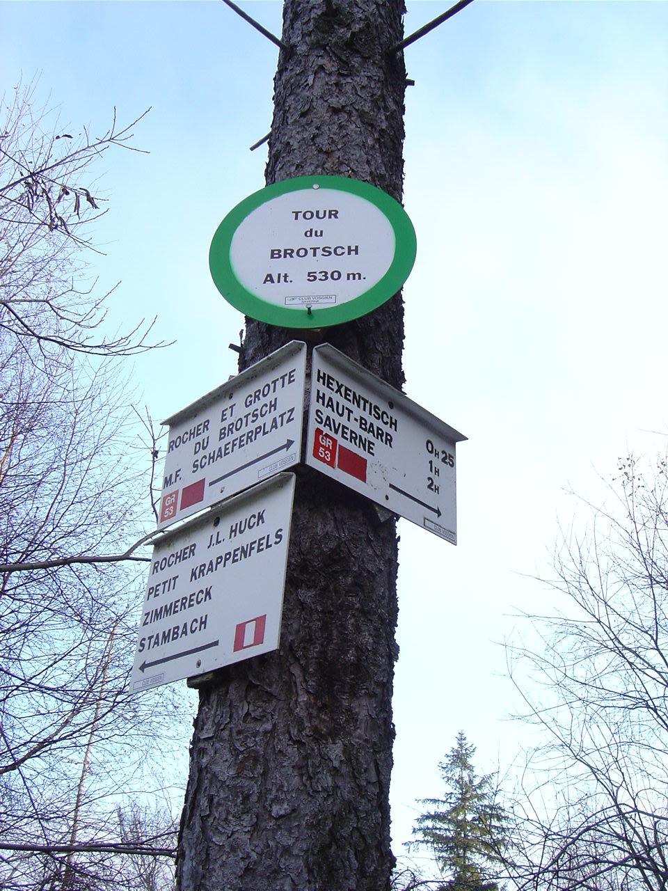 Panneaux directionnels au Brotschberg